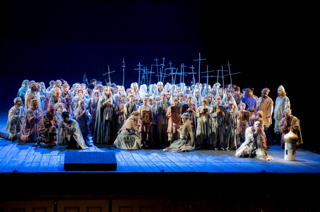 האופרה בוריס גודונוב